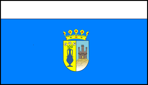 Bandera de Zafra (Badajoz)